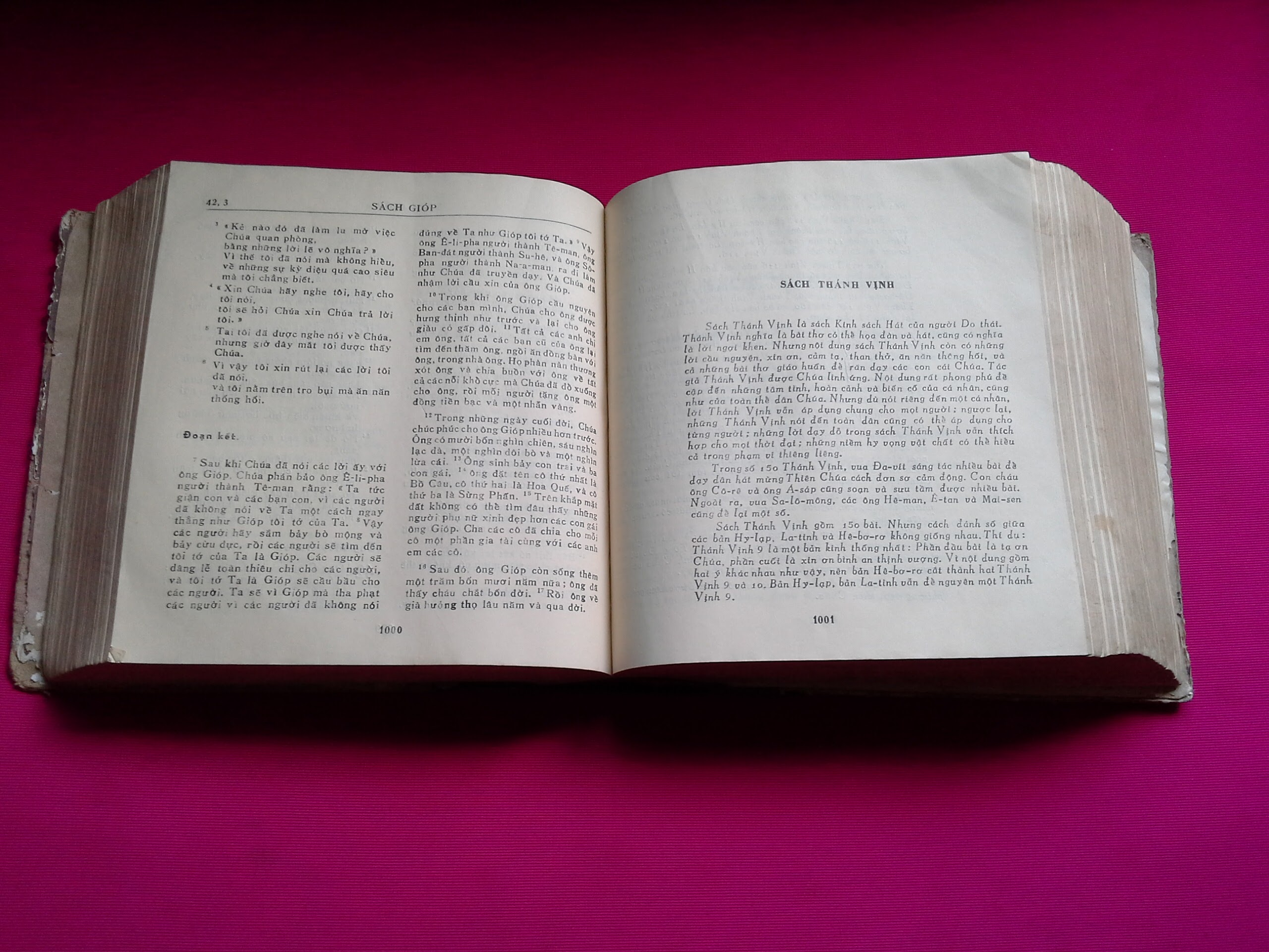 Một trang trong bản dịch Kinh Thánh ra tiếng Việt (bao gồm 46 sách Cựu Ước và 27 sách Tân Ước) do Giuse Maria Trịnh Văn Căn thực hiện, Tòa Tổng giám mục Hà Nội xuất bản, Hà Nội 1985. Sách dày 2362 trang khổ 19x20cm, được in 8000 cuốn tại Xí nghiệp in 75 Hàng Bồ, Hà Nội. Giấy phép xuất bản số 46/S/GPHT/XB ngày 23-2-1985 của Cục Xuất bản và báo chí. Số in: 65/85. In xong và gửi lưu chiểu tháng 1-1989